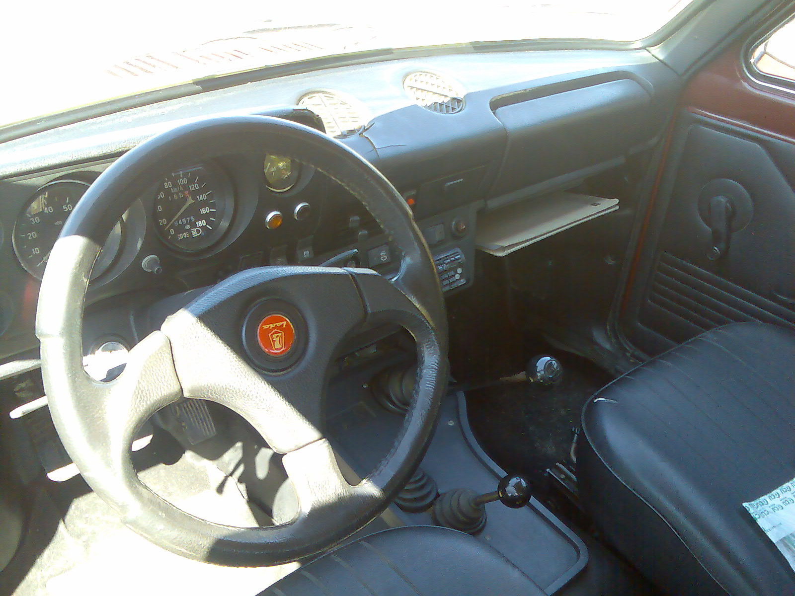 INTERIOR LADA NIVA ANTERIOR A 1994